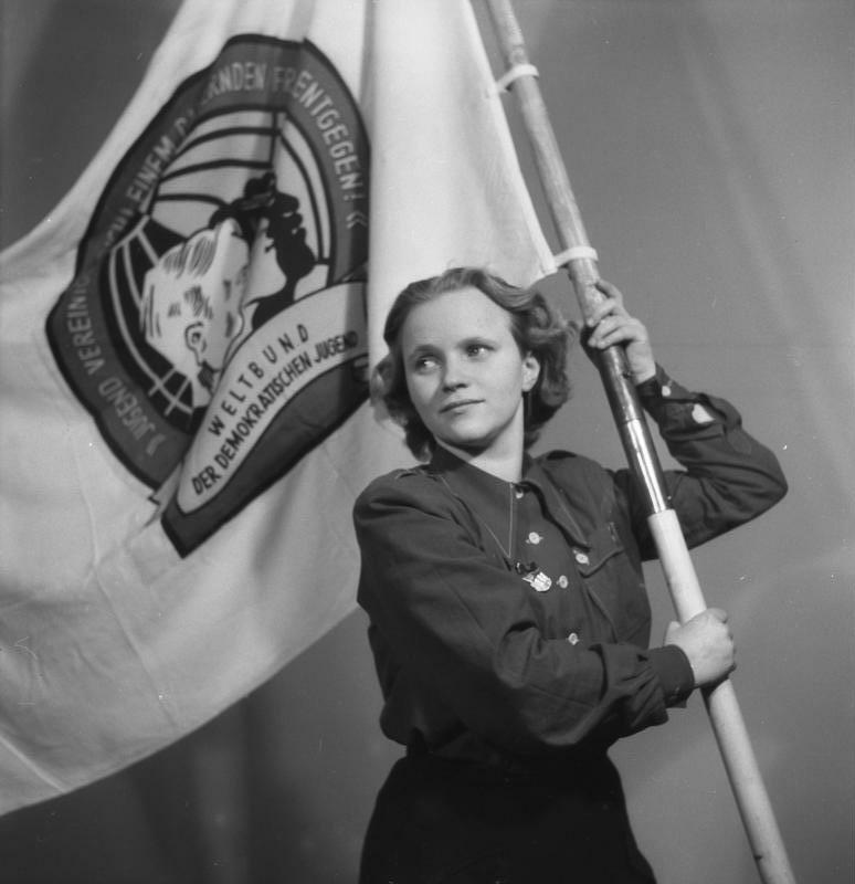 FDJ Mädel mit Weltjugendfahne